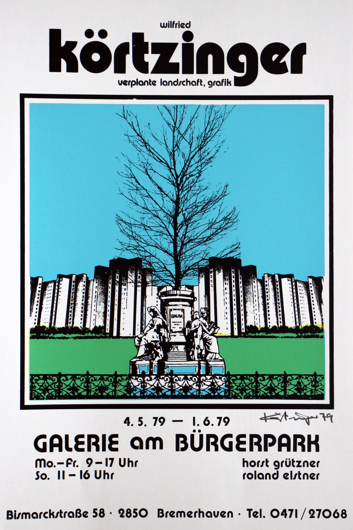 Plakat zu einer Ausstellung des Künstlers Wilfried Körtzinger in der Bremer Galerie am Bürgerpark, Mai/Juni 1979